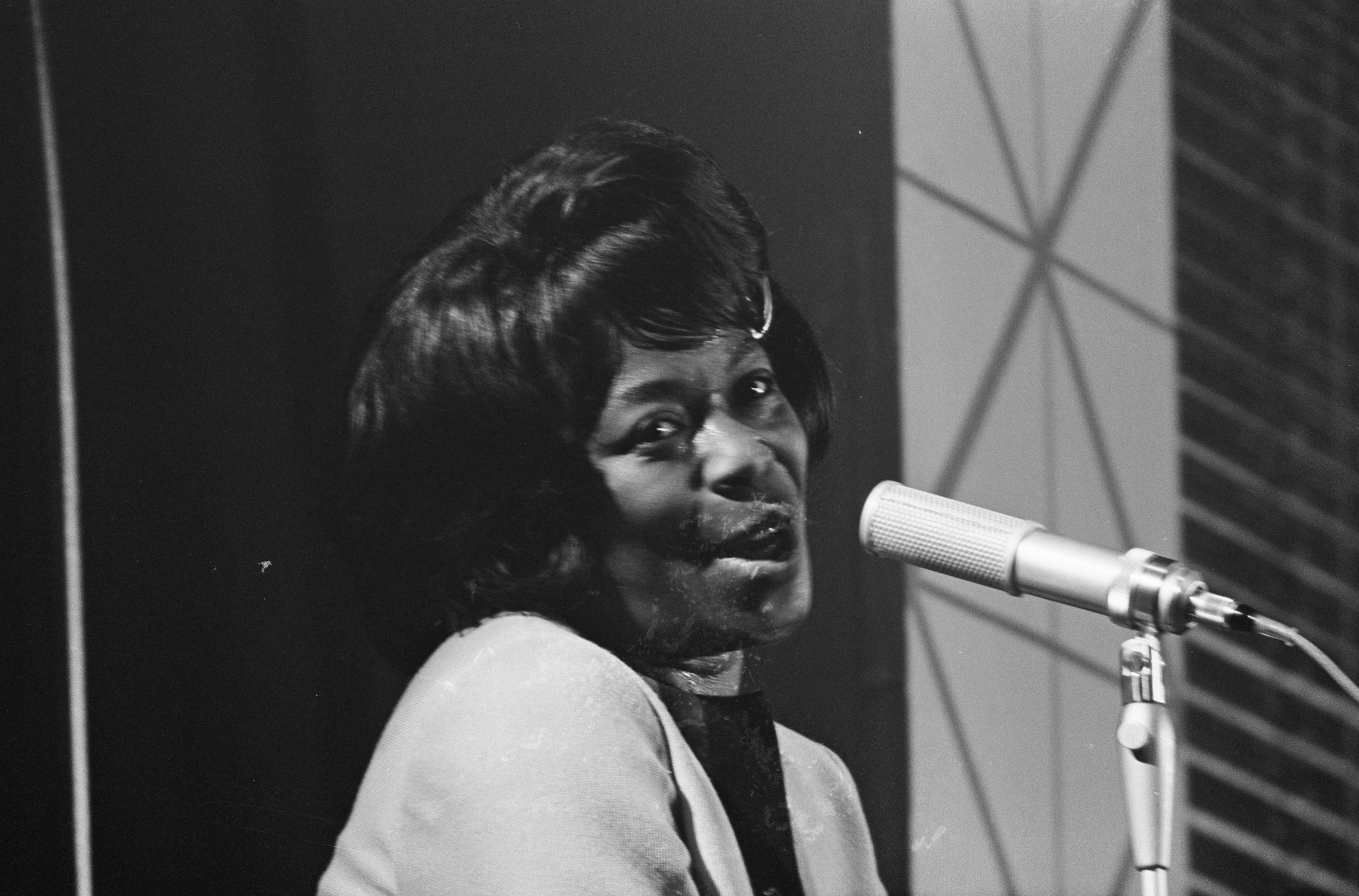 Collectie / Archief : Fotocollectie Anefo Reportage / Serie : [ onbekend ] Beschrijving : Grand Gala du Disque populaire in Kurhaus te Scheveningen Sarah Vaughan Datum : 12 oktober 1963 Locatie : Scheveningen, Zuid-Holland Instellingsnaam : Kurhaus Fotograaf : Koch, Eric / Anefo Auteursrechthebbende : Nationaal Archief Materiaalsoort : Negatief (zwart/wit) Nummer archiefinventaris : bekijk toegang 2.24.01.05 Bestanddeelnummer : 915-6268